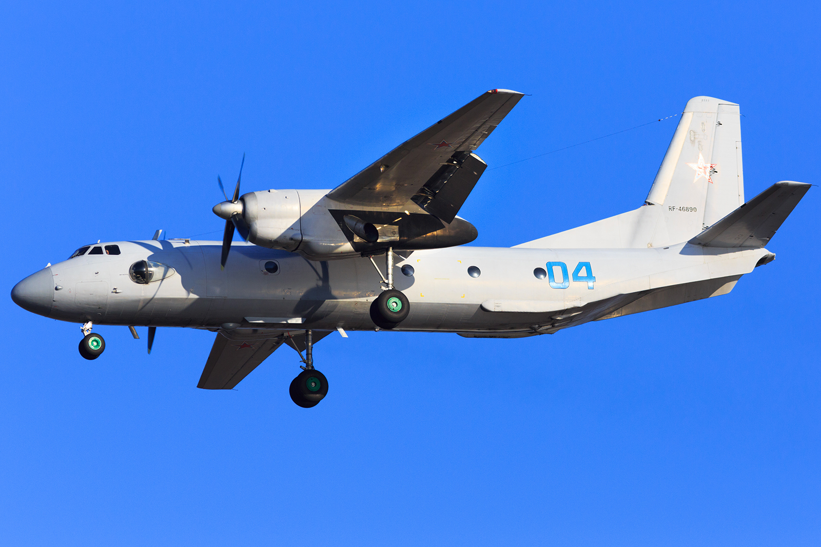 VVO_0499